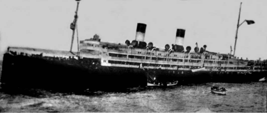 Foto do navio Principessa Mafalda de bandeira italiana em operação de abandono de navio em 25 de outubro de 1927. O barco naufragou na costa do Estado da Bahia, Brasil.